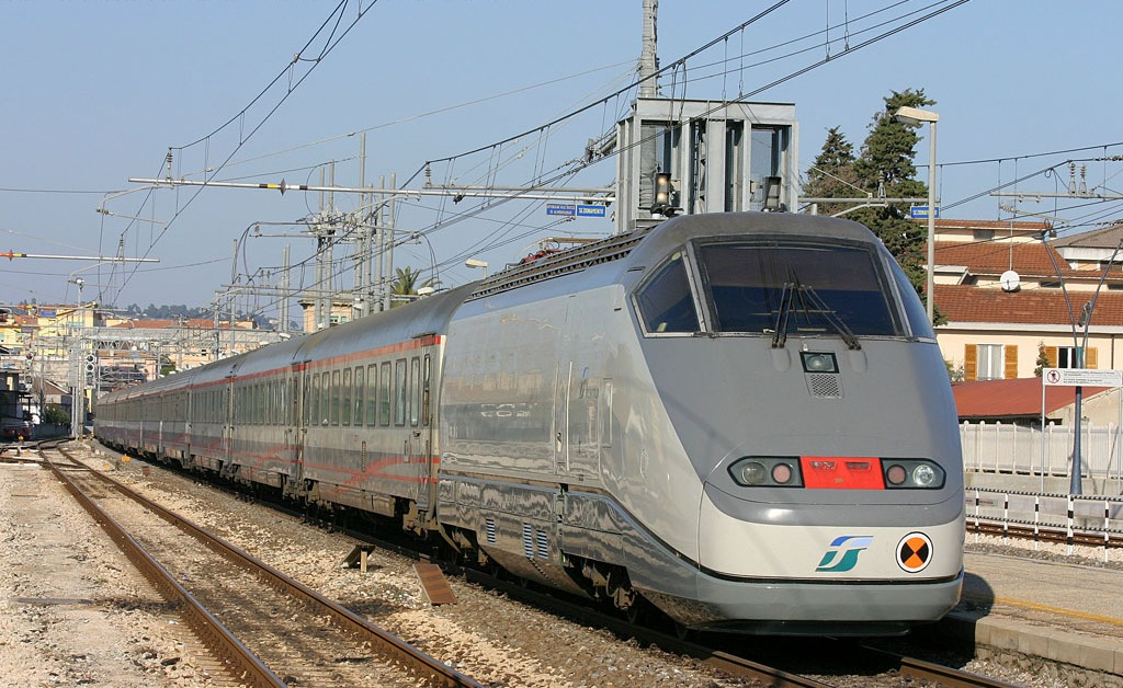 E.414 serie 100 a San Benedetto del Tronto